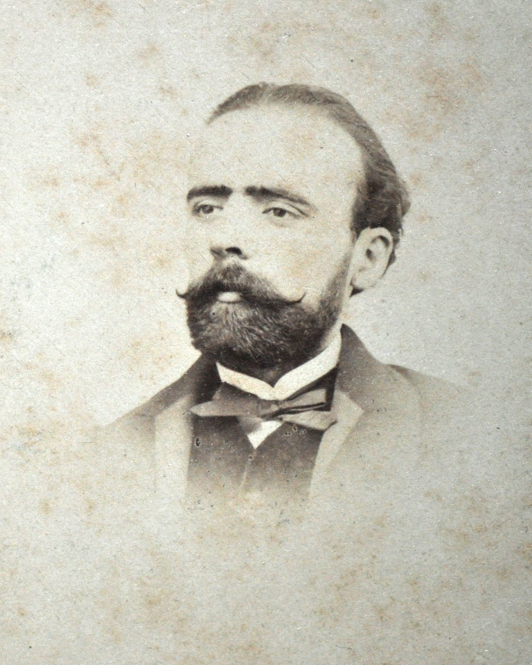 Foto de los años 1860.